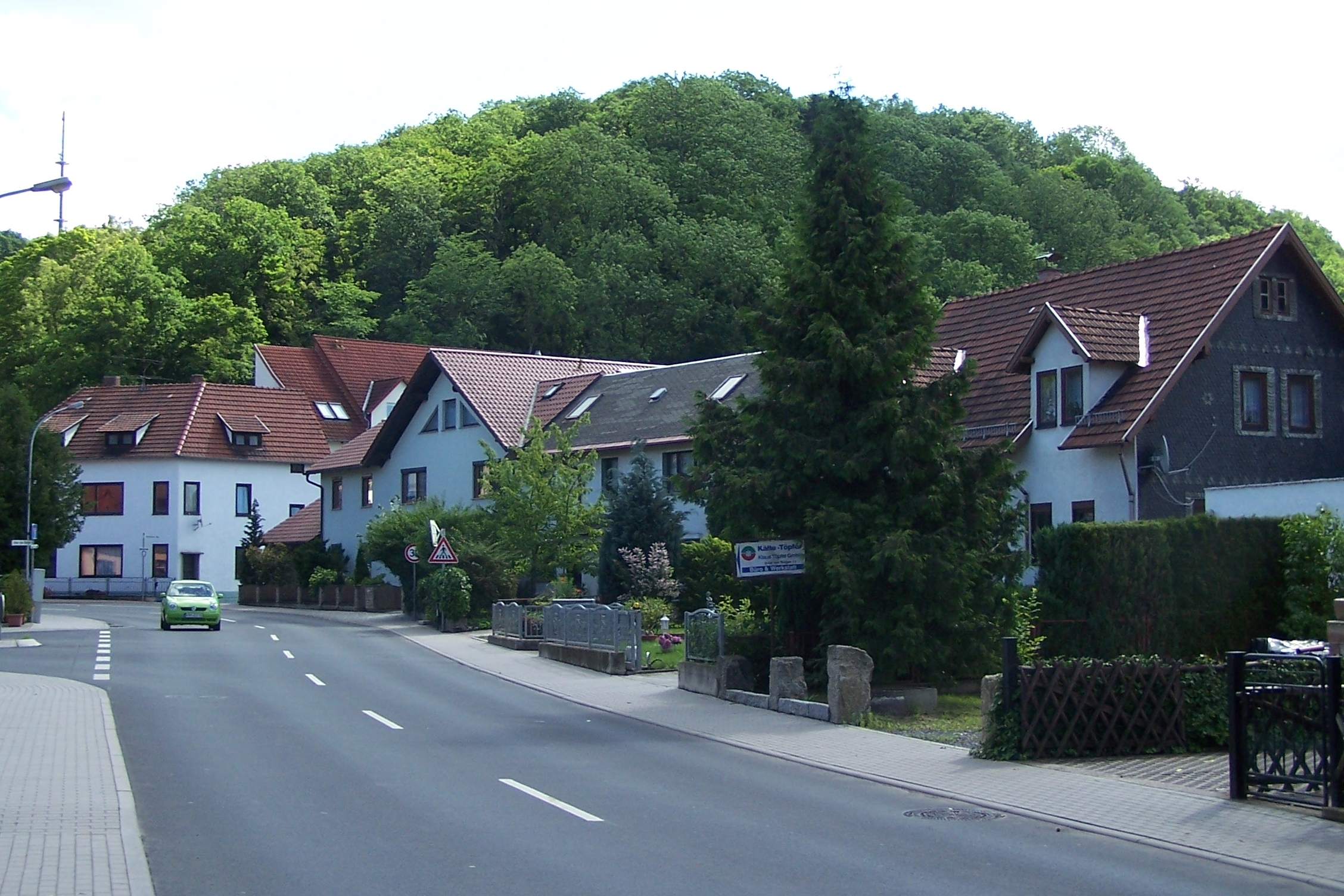 Blick von der Werrabrücke zum Frankenstein im Bad Salzunger Stadtteil Kloster.